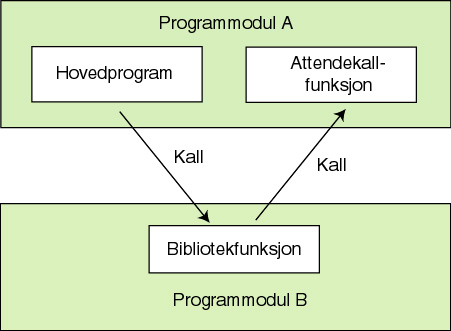 Fonction de rappel